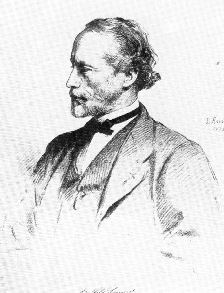 Portrait